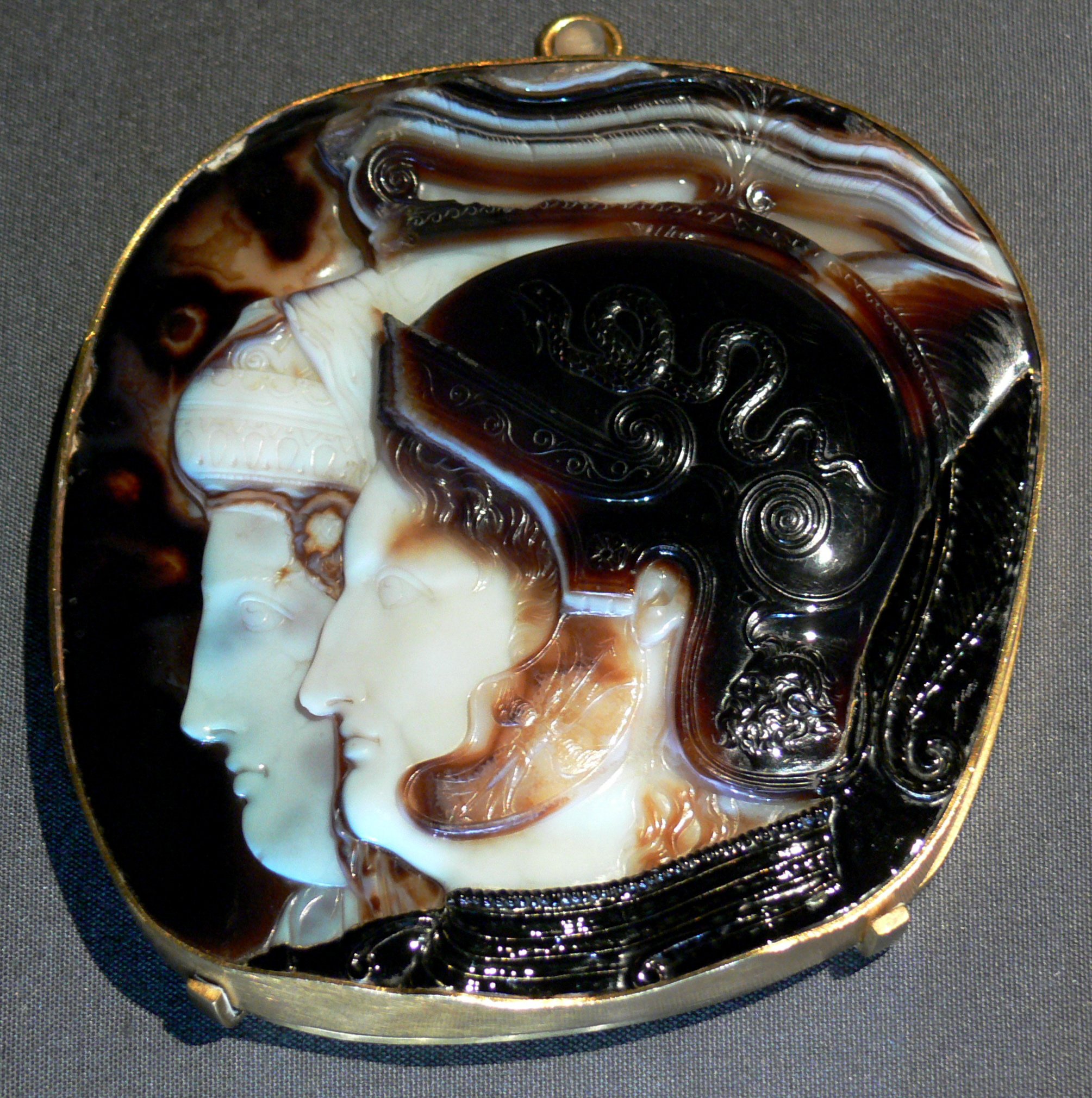 Ptolemäer-Kameo. Griechisch, Hellenistisch. 278–269 v. Chr. Elfschichtiger arabischer Onyx, dunkelbraun und bläulich-weiß. Fassung: Goldreif, 16. Jh. (?). H. 11,5 cm, B. 11,3 cm. Kunsthistorisches Museum Wien, Antikensammlung. Inv.-Nr. IXa 81. Fundort: Unbekannt. Provenienz: Schatzkammer; 1779 Übernahme.